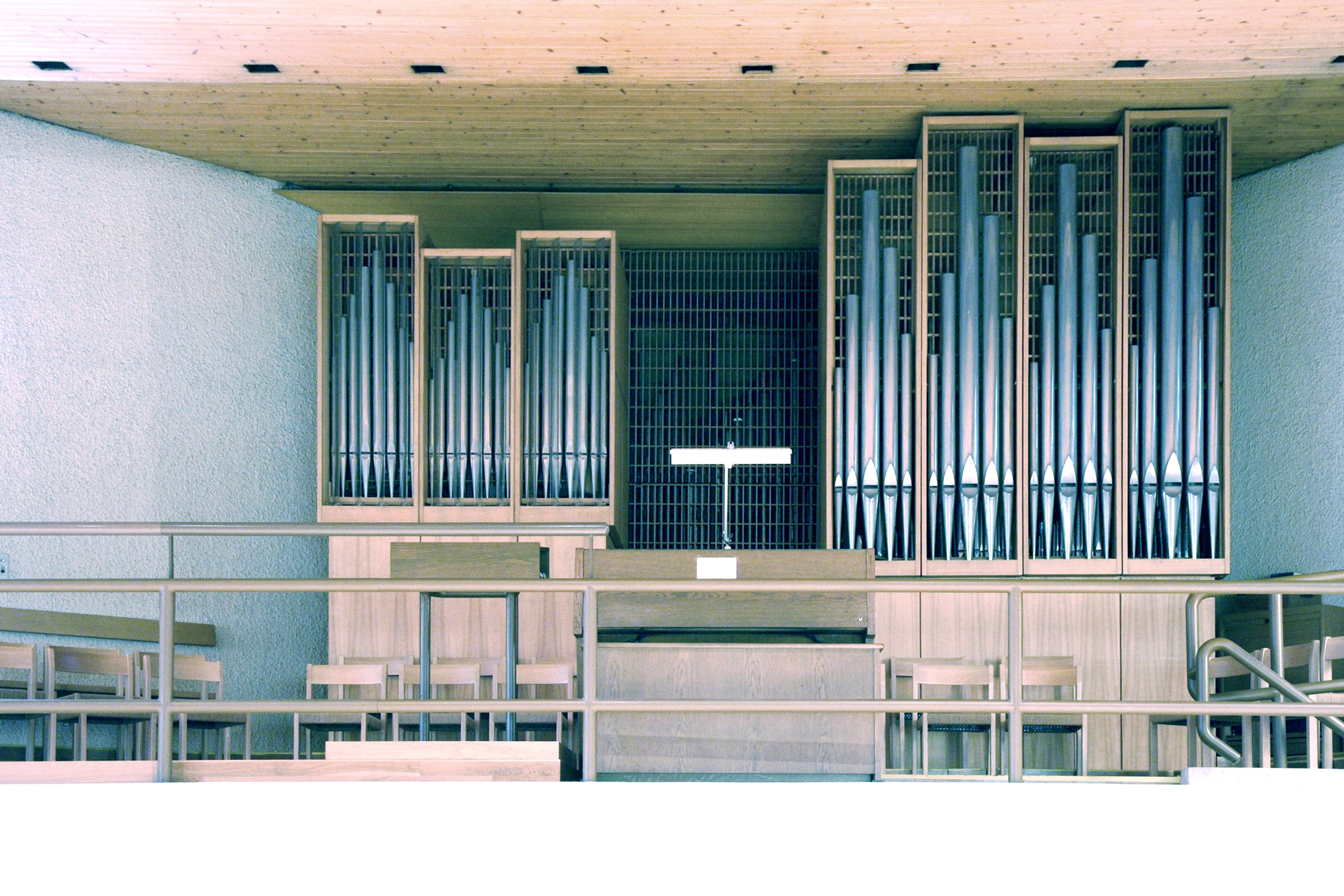 römisch-katholische Pfarrkirche St. Anna Opfikon-Glattbrugg